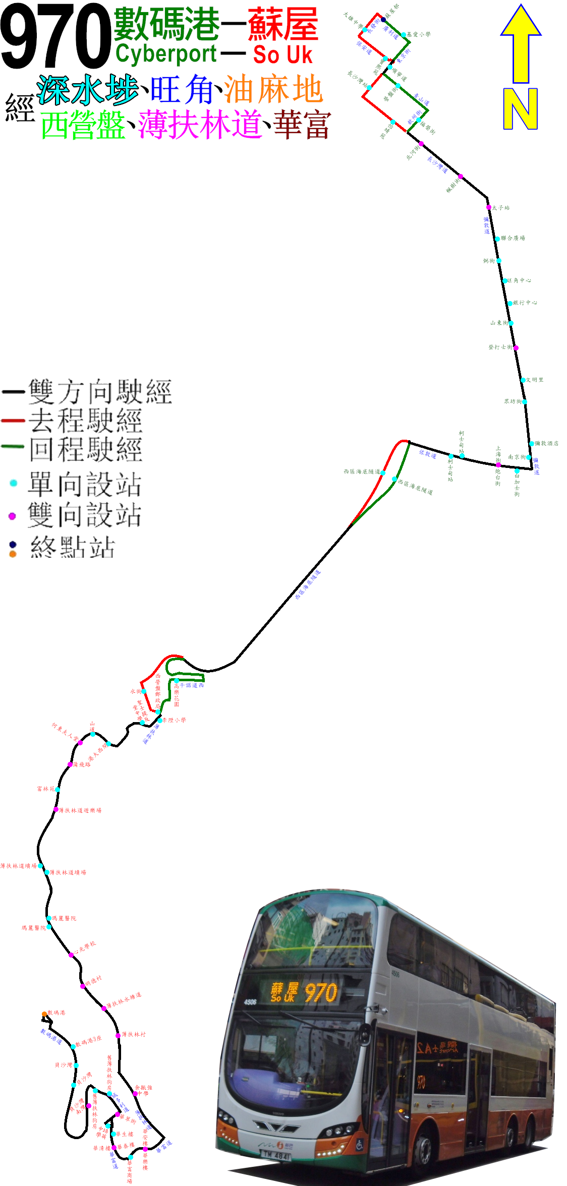 中文（香港）: 過海隧巴970線的走線圖